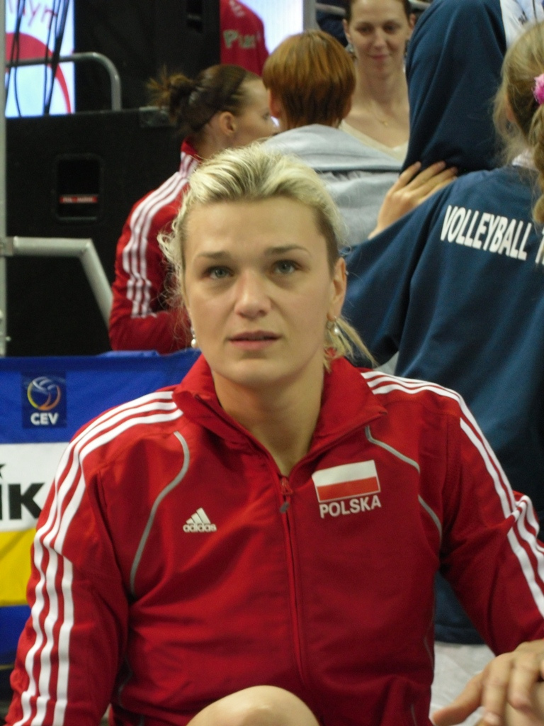 Małgorzata Glinka - zdjęcie zrobione podczas II memoriału Agaty Mróz-Olszewskiej w katowickim Spodku.